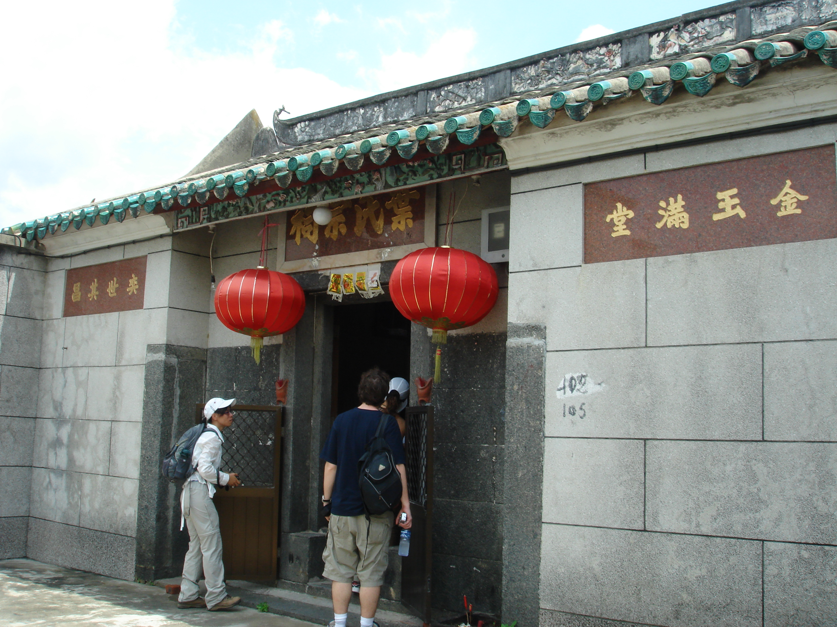 中文（香港）: 蓮麻坑葉氏宗祠。